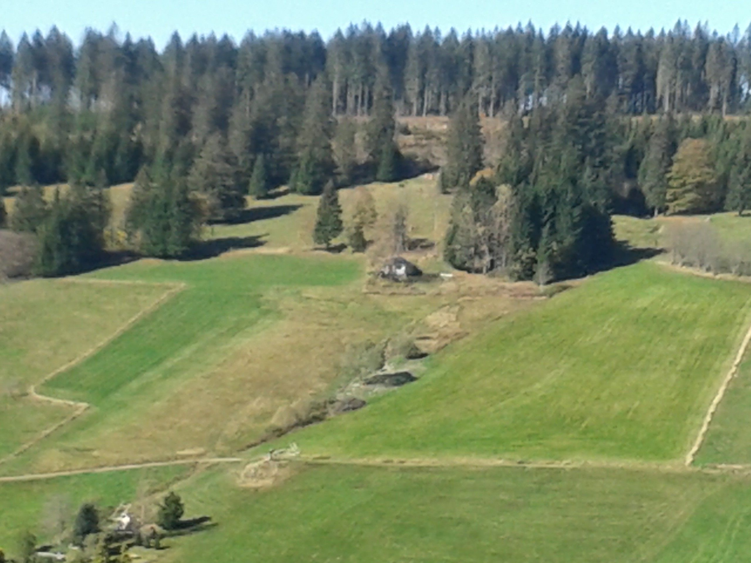 Sicht vom Rundweg